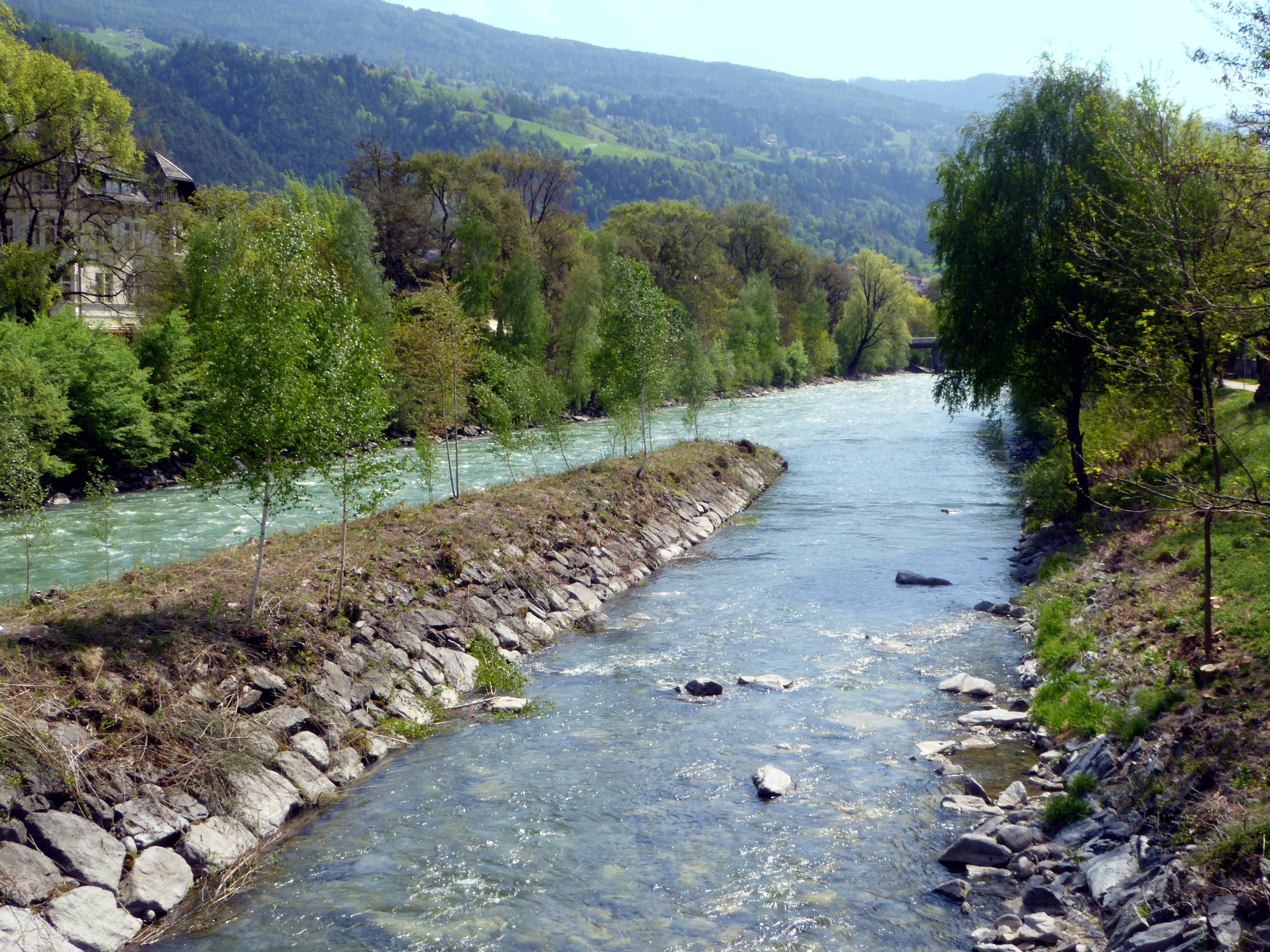 Brixen, Mündung der Rienz (links) in den Eisack (rechts).